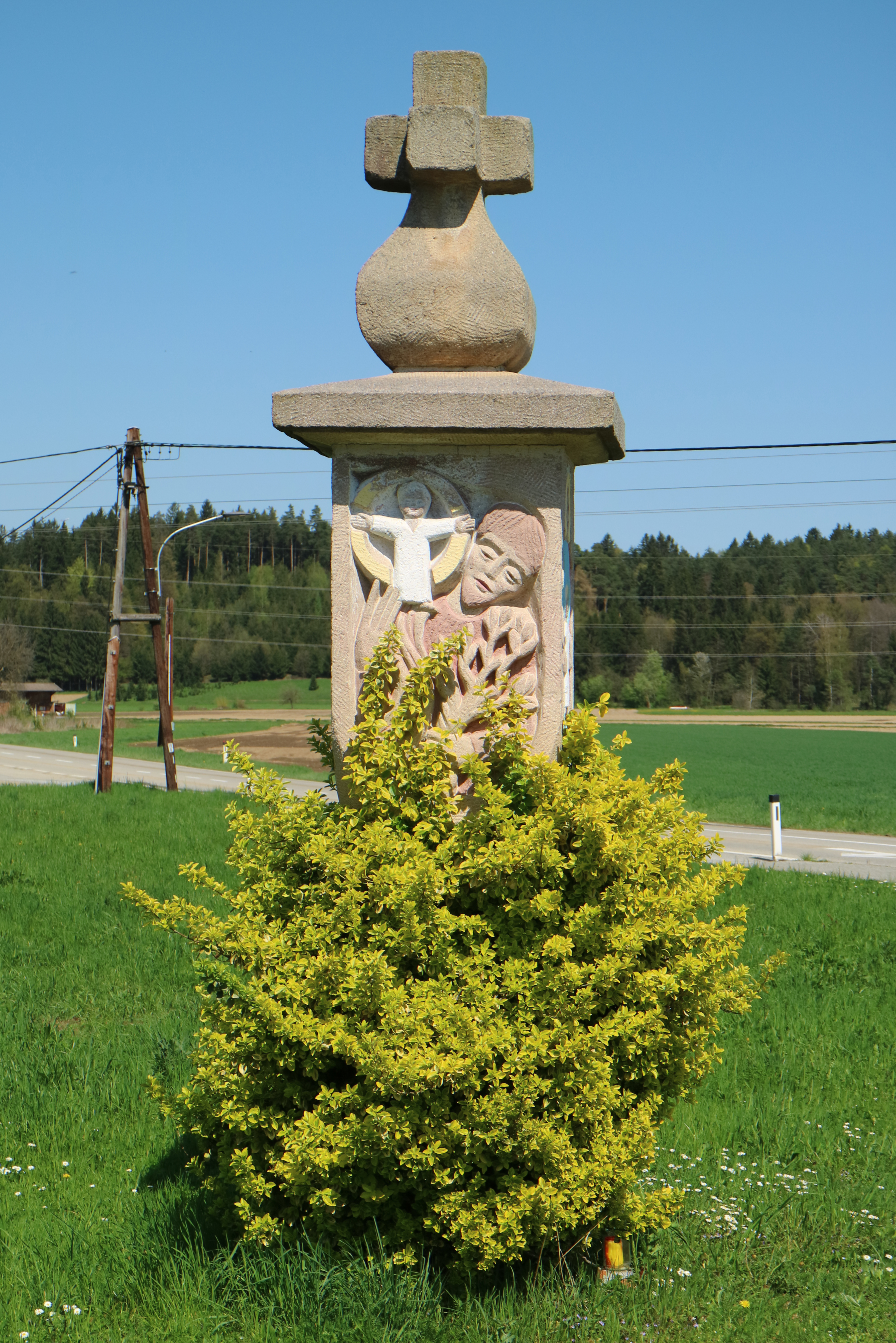 Bildstock von Alfred Schlosser (1981) in Dietersdorf, Gemeinde Dobl-Zwaring (Steiermark)